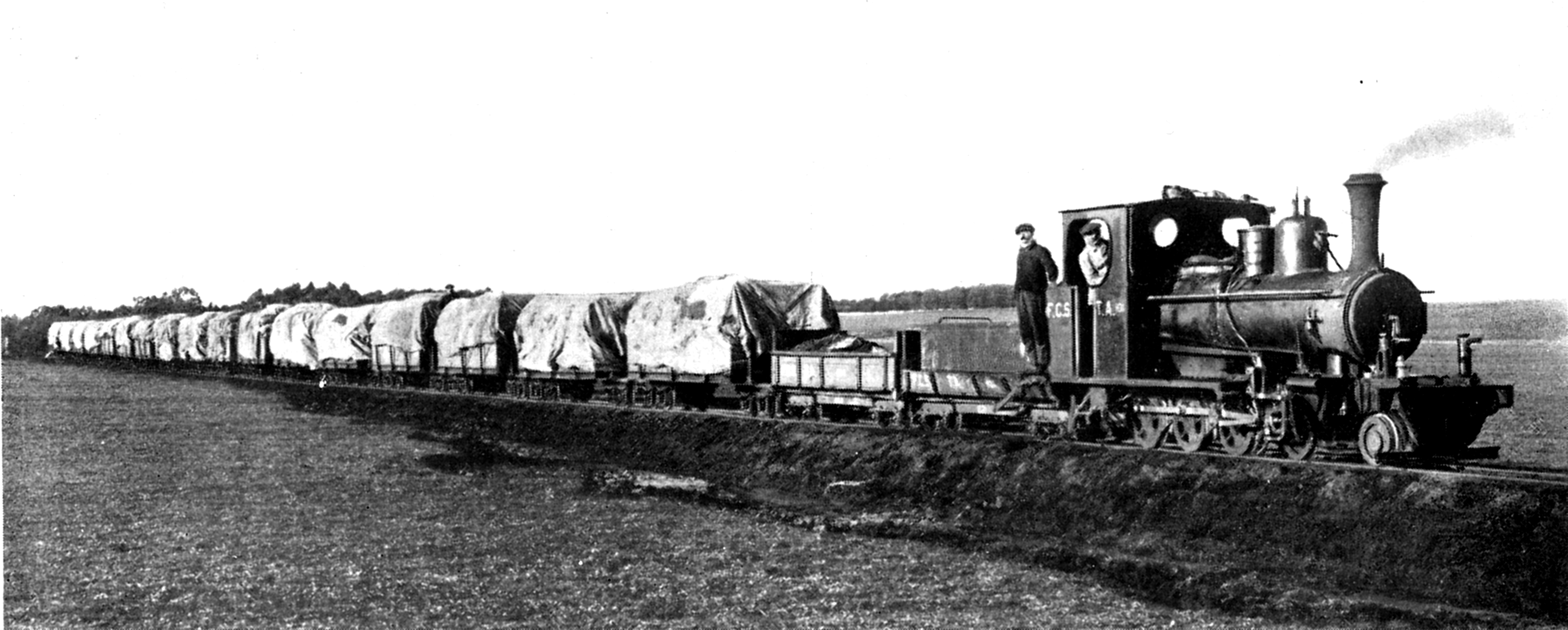 ex WD Hunslet 4-6-0, Balcarce, Argentina, mid 1920's